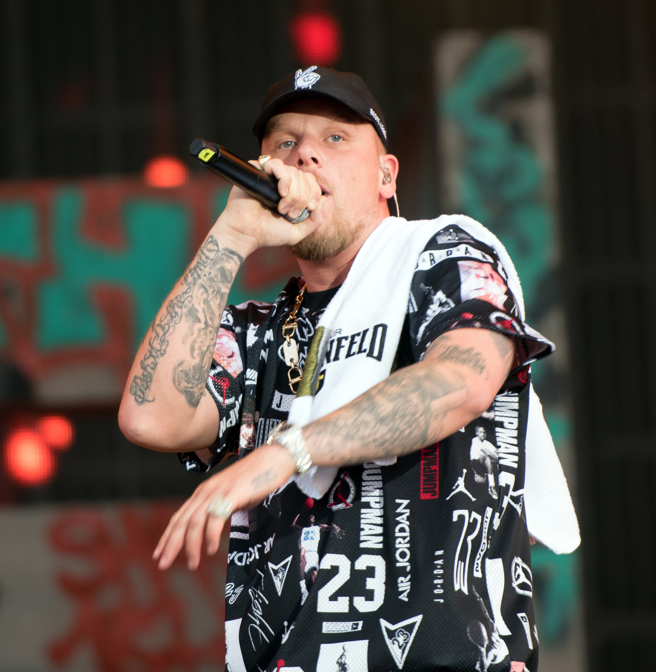 Bonez MC live auf dem Openair Frauenfeld 2019